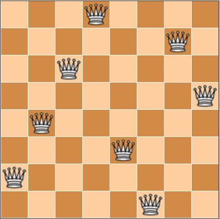 צילום מסך של תוצר של תבנית בוויקיפדיה